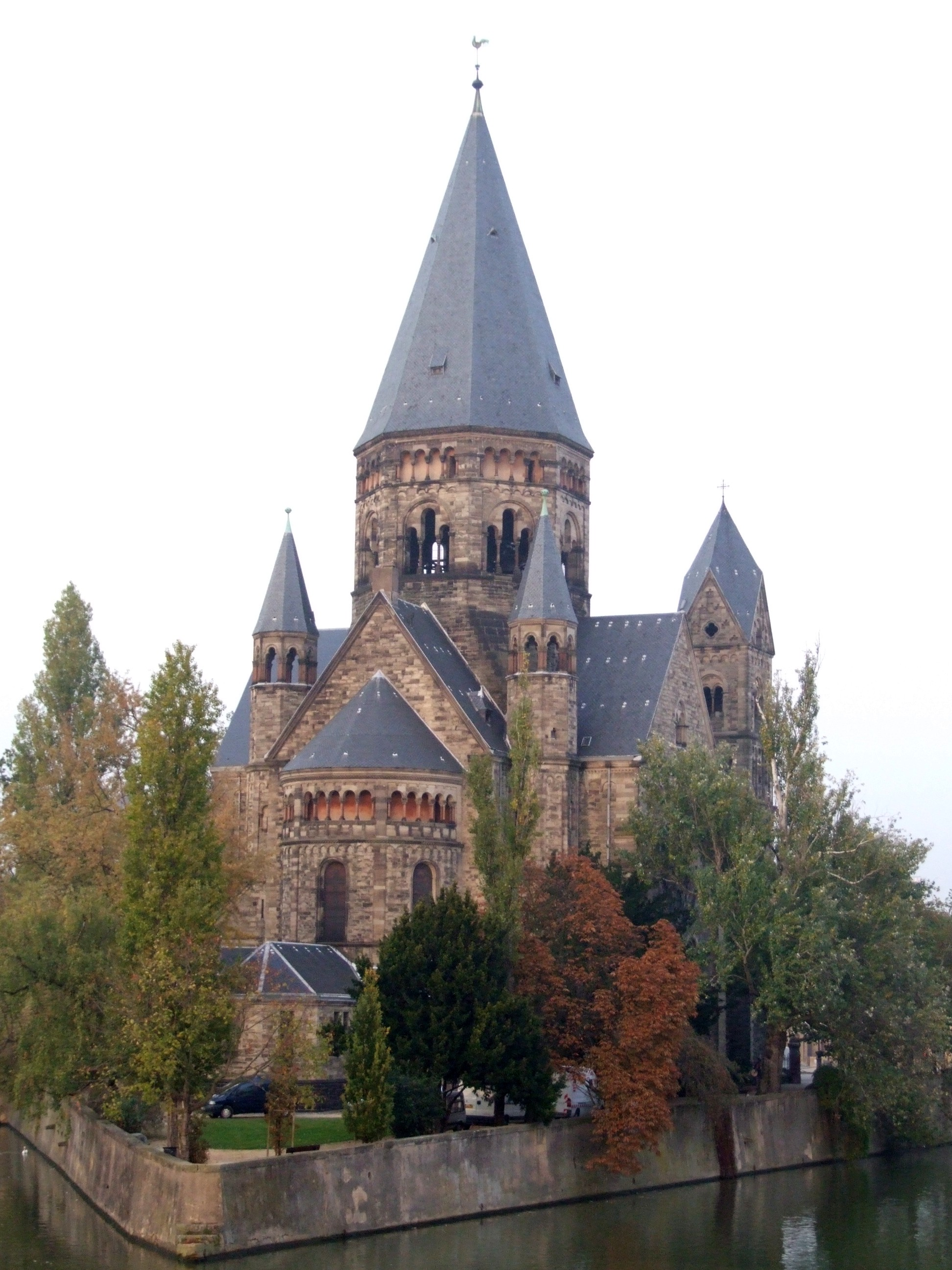 Temple neuf, Metz, FRANCE